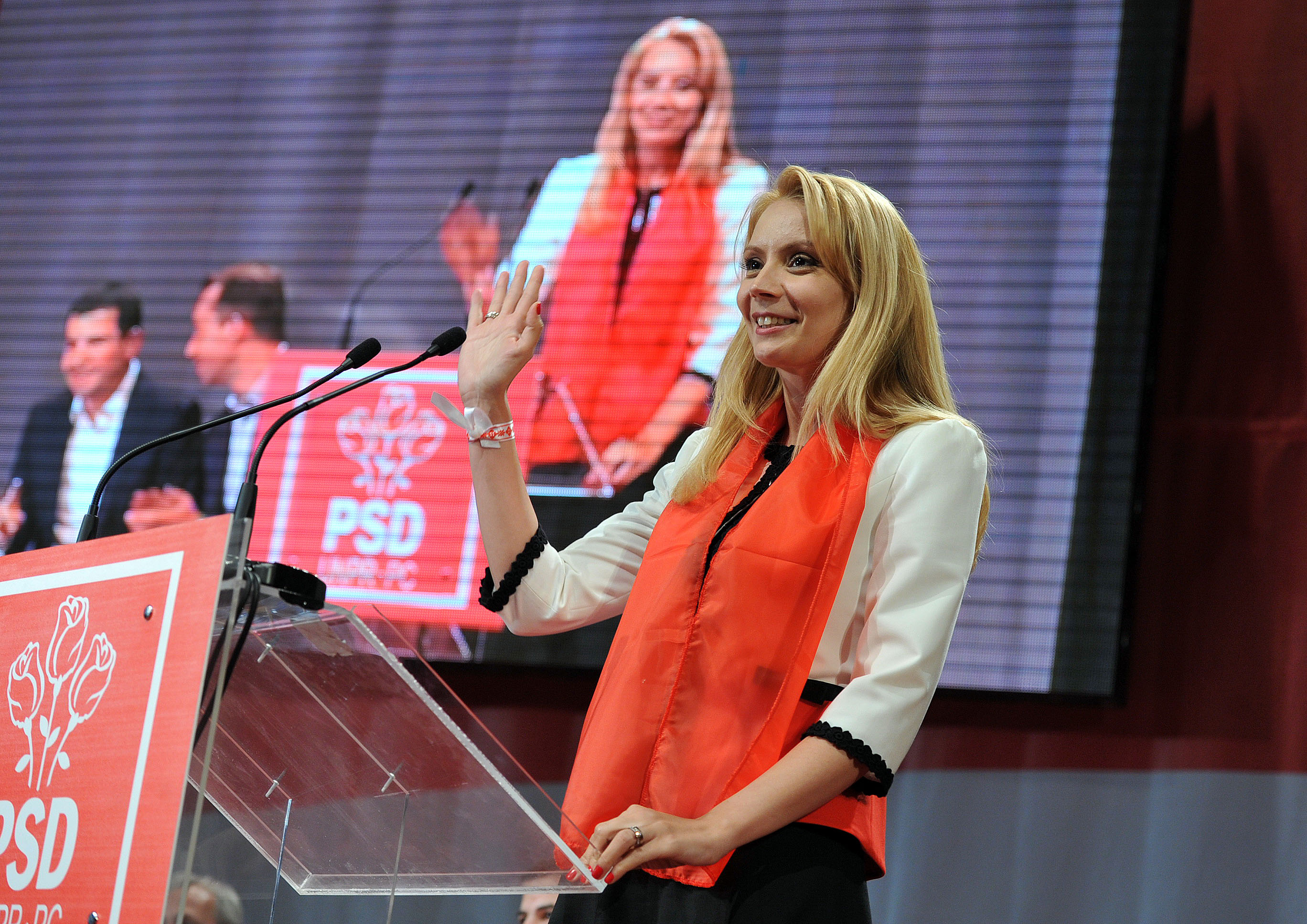 5. Mitingul Electoral al Aliantei PSD-UNPR-PC, Sibiu - 21.05 (15)